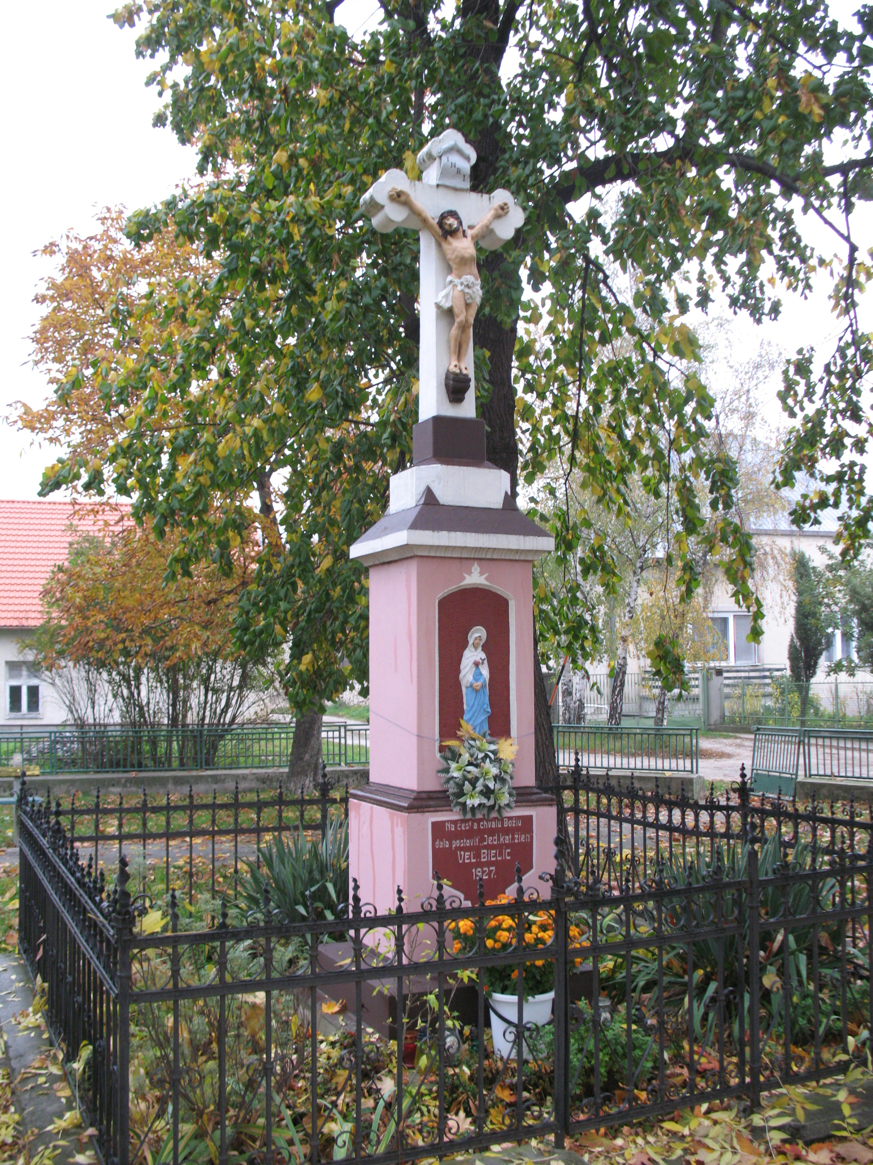 Nagybélic